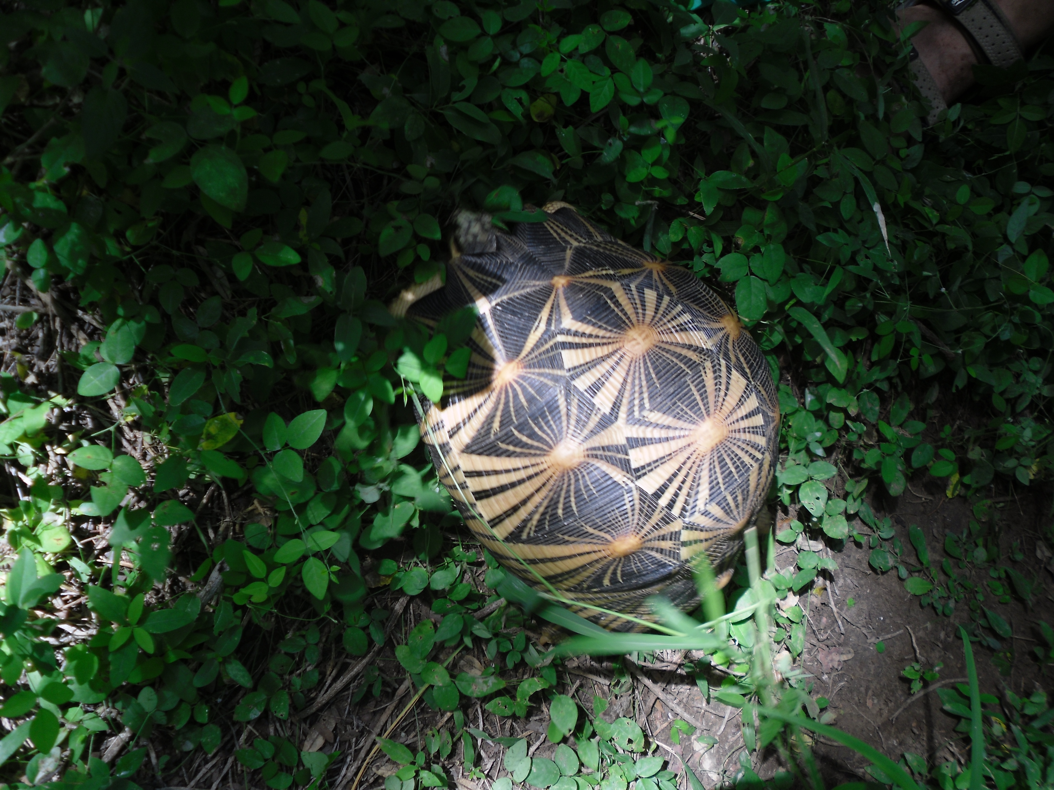 Geochelone radiata - Riserva speciale di Bezaha Mahafaly